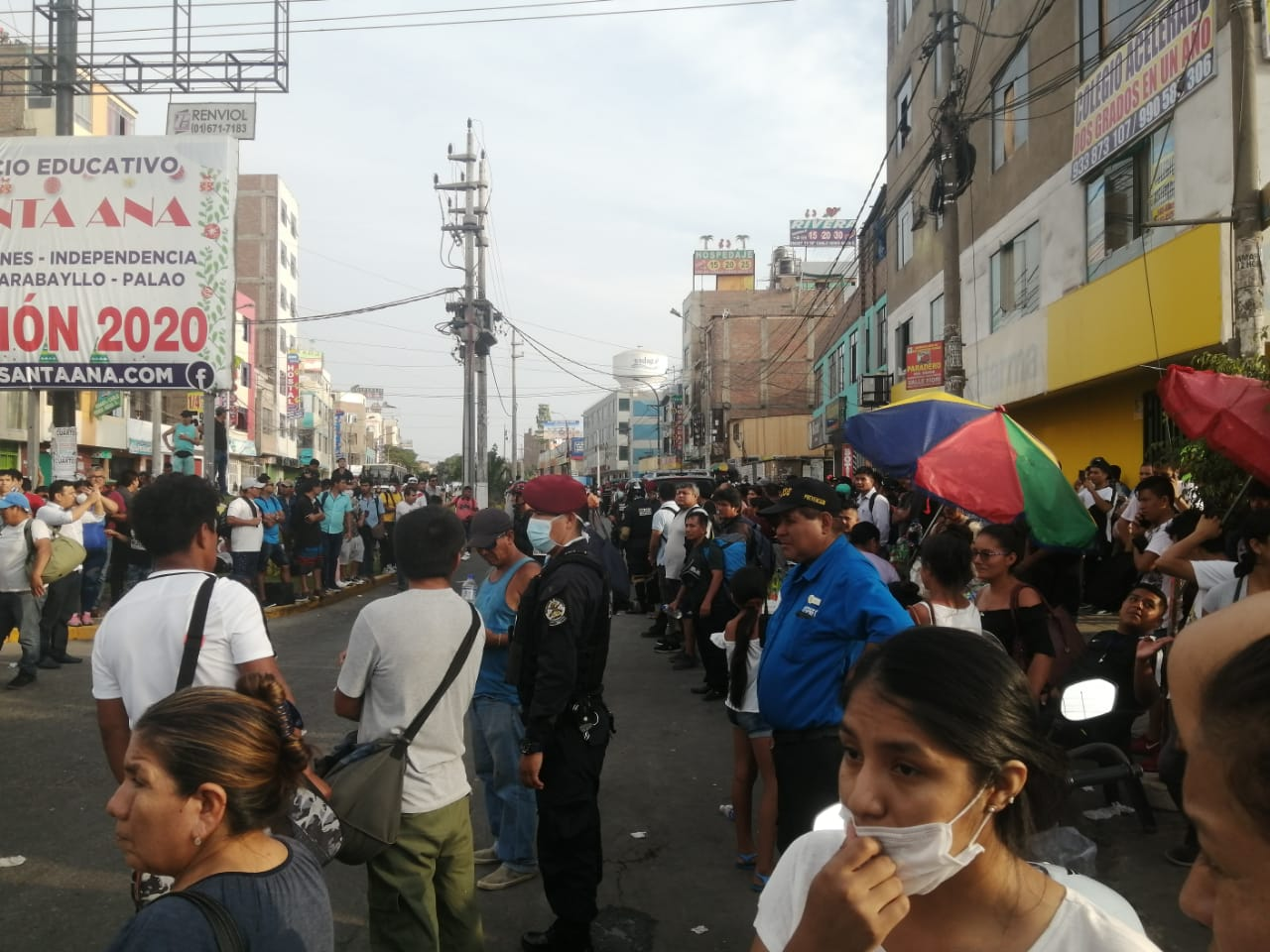 Alrededores del ex terminal Fiori en San Martín de Porres durante el Estado de Emergencia Covid-19 en Perú